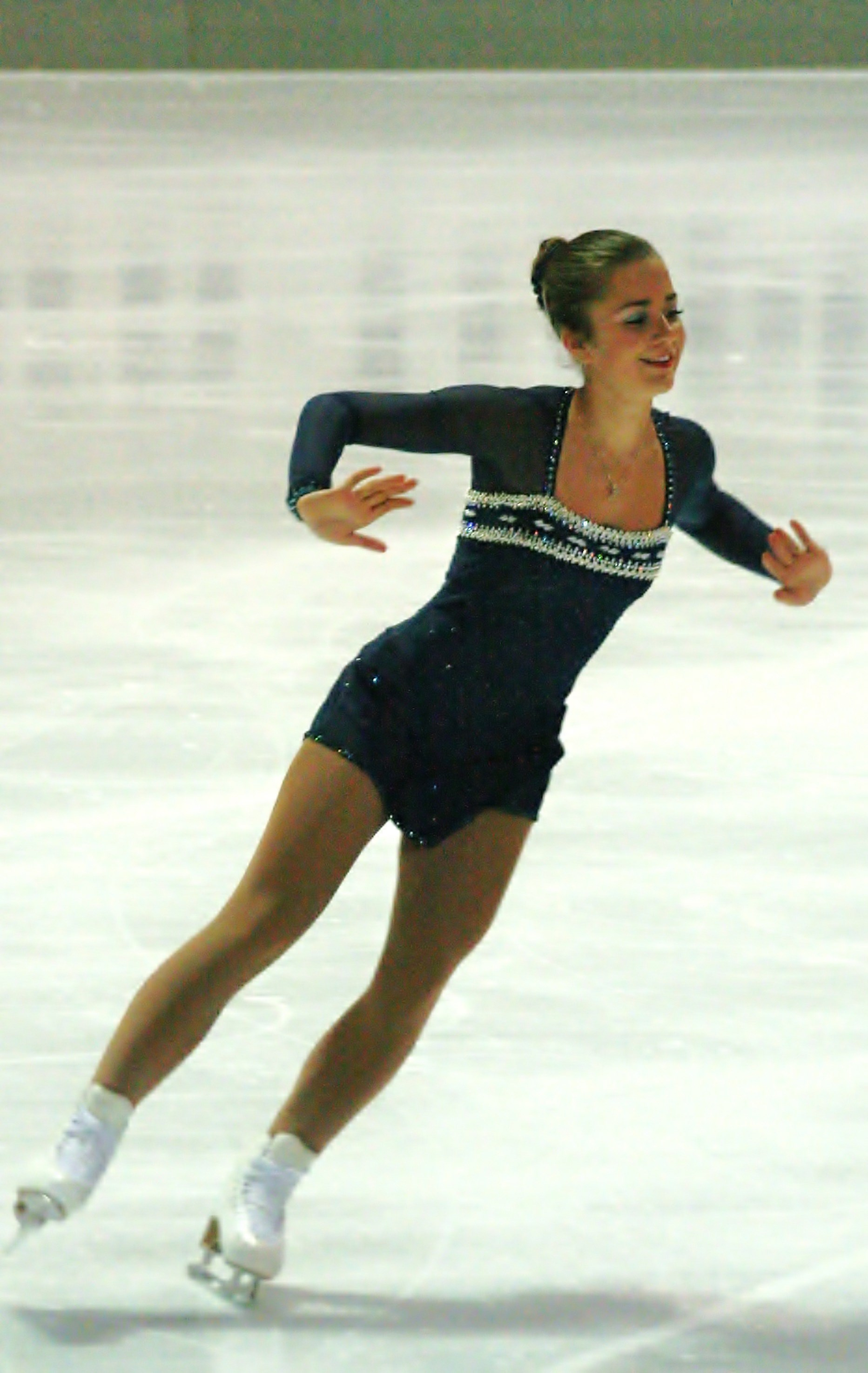 Вероник Малле (Канада) на 2013 Nebelhorn Trophy.